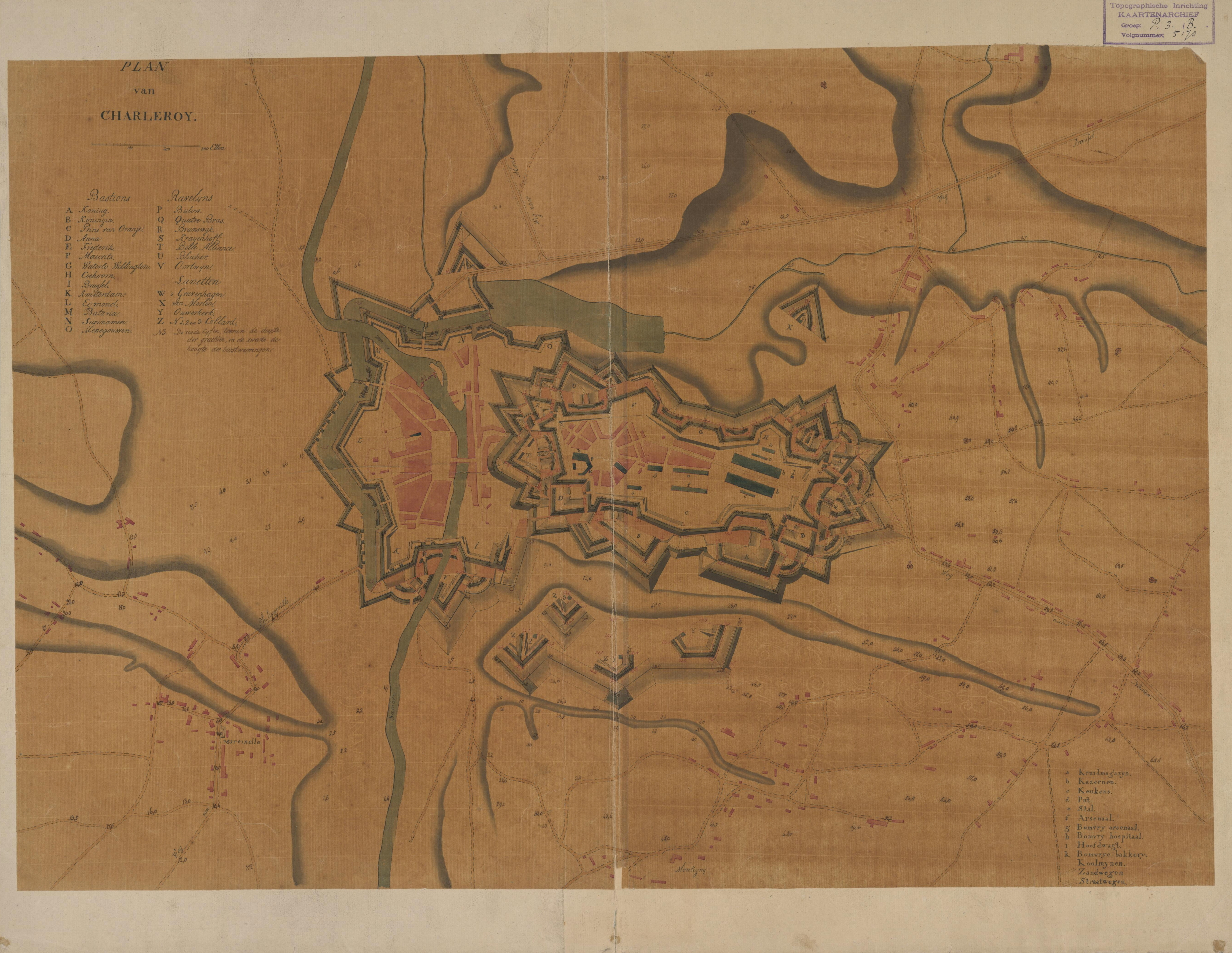 Charleroi (Belgique) - Plan de la forteresse de l'armée du Royaume-Uni des Pays-Bas (entre 1816 et 1830). Dessin à plume et à l'aquarelle sur calque collé sur papier. 46,4 x 66,4 cm pour le calque. Document transmis en 1934 à la Belgique par le Gouvernement Néerlandais.